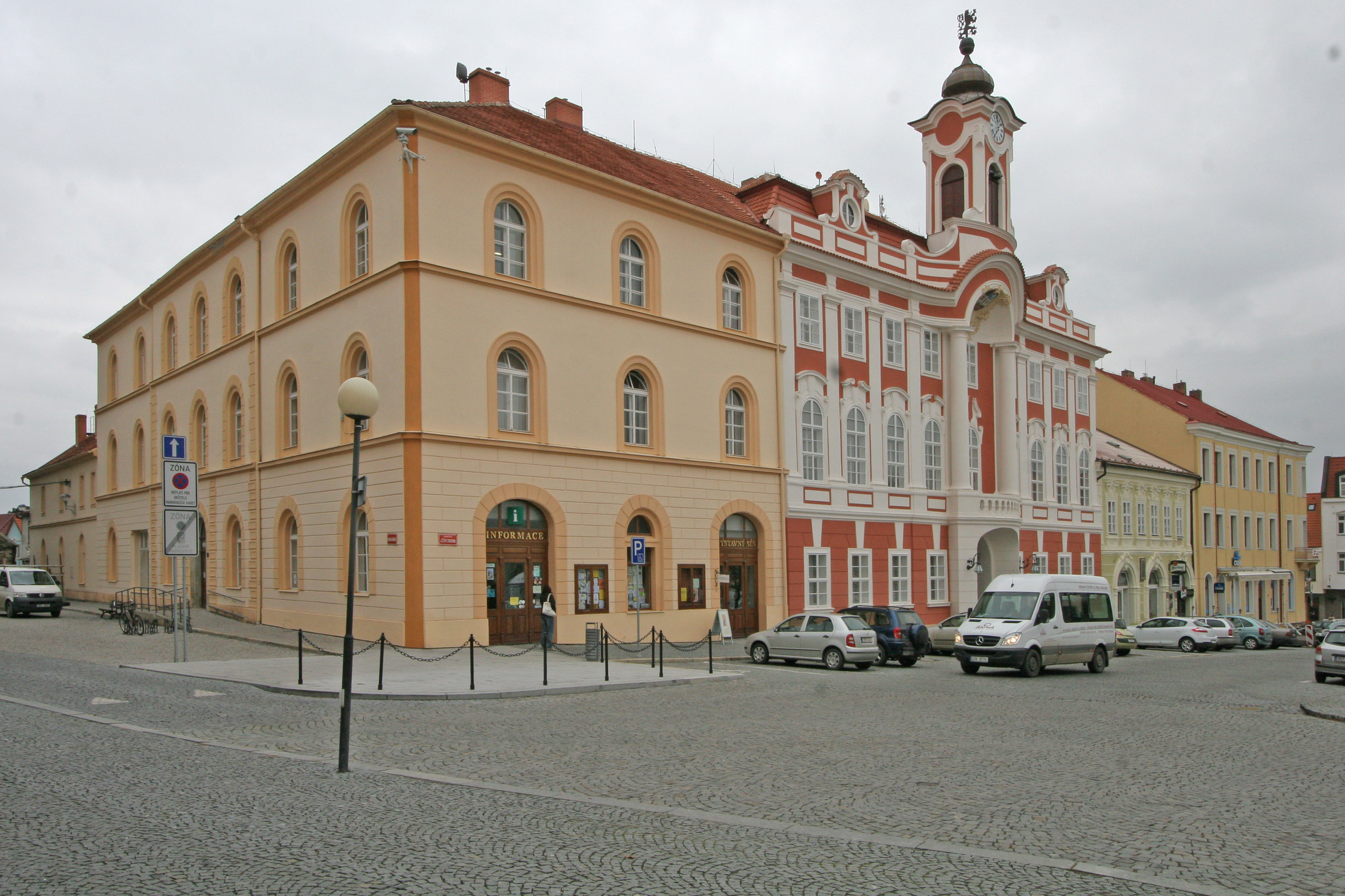 Knihovna (Čáslav), Kostelní nám. 197/11, Čáslav